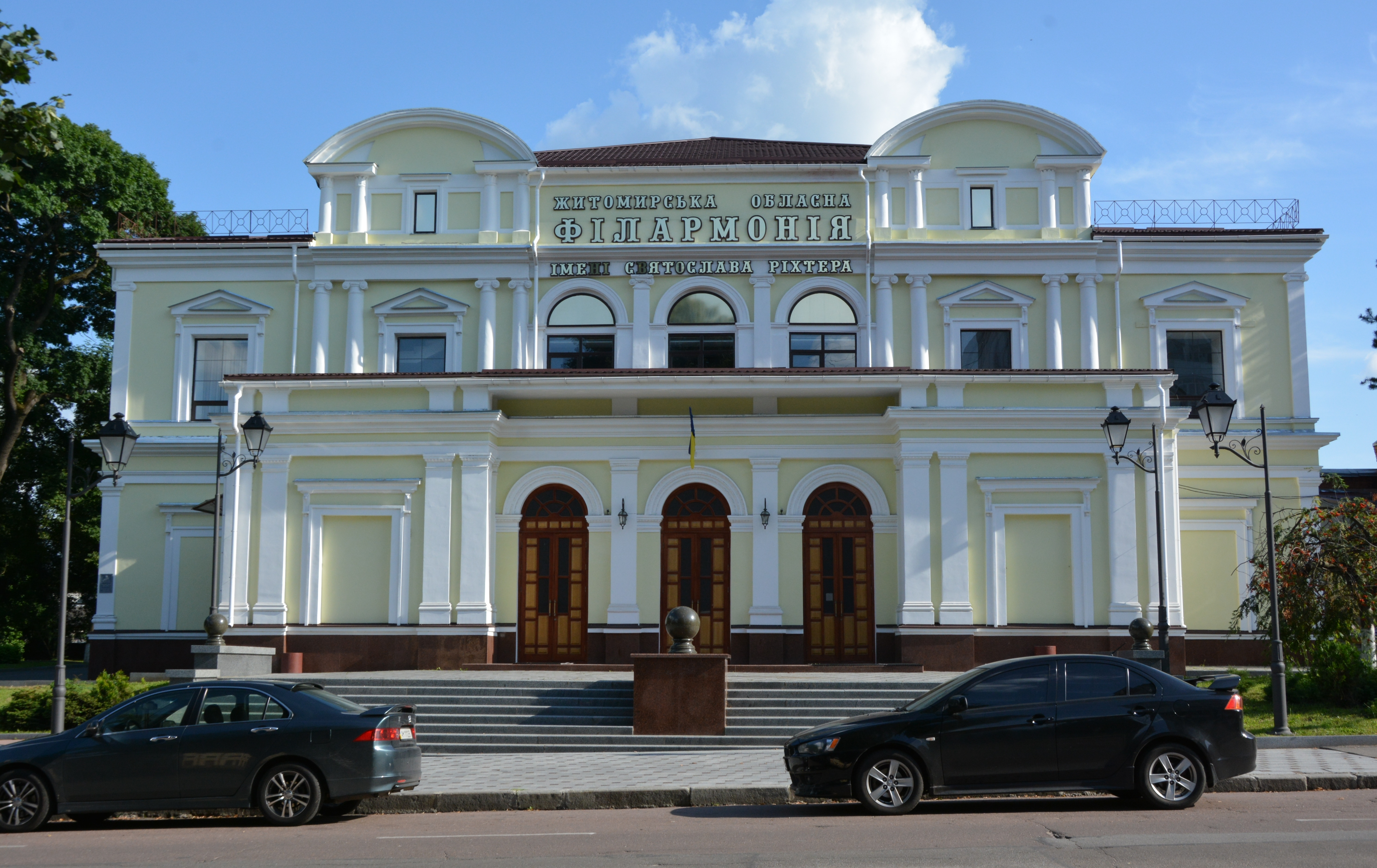 Міський театр (філармонія), Житомир, вул. Пушкінська, 26